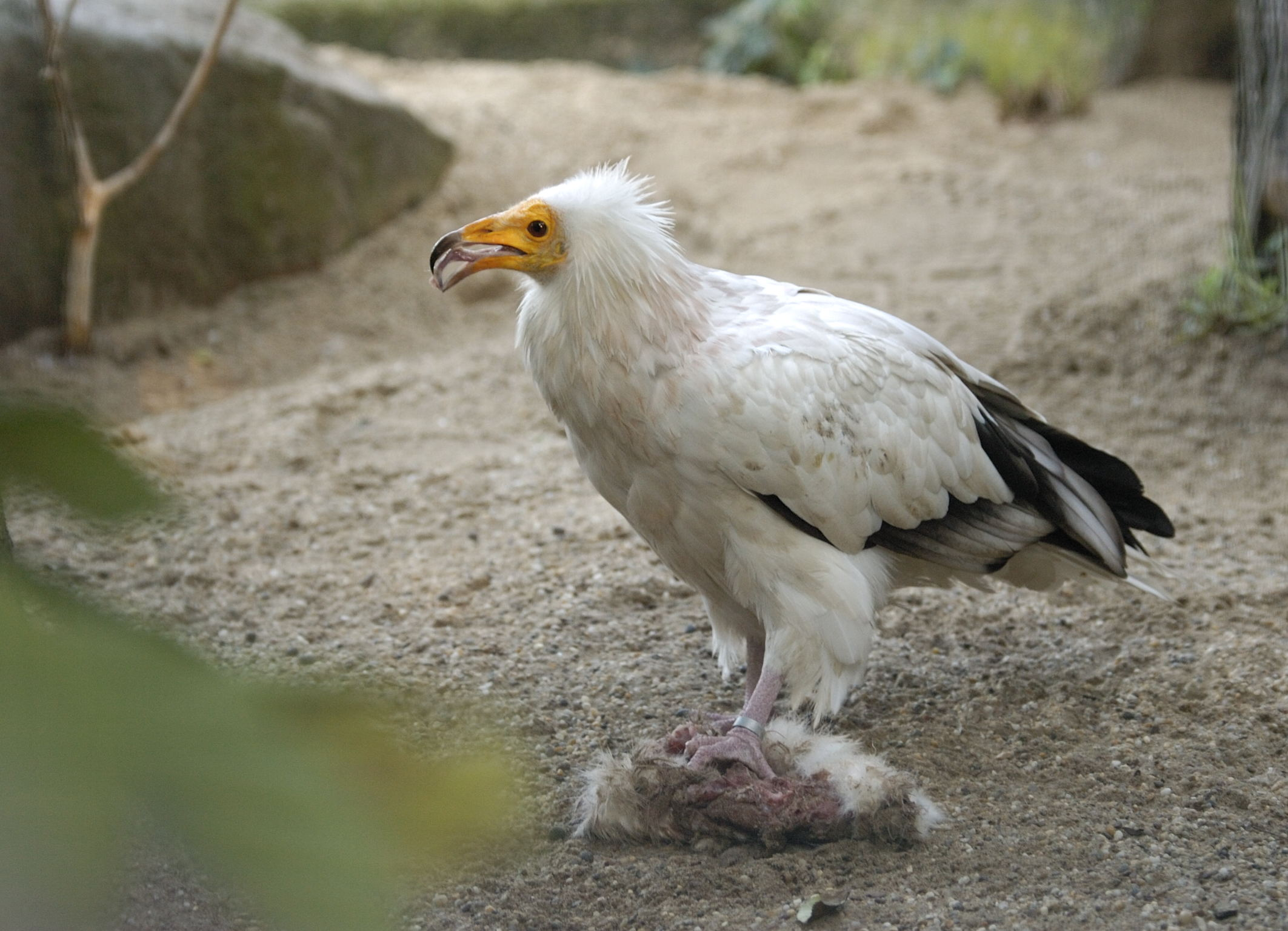 Schmutzgeier (Neophron percnopterus) im Tiergarten Schönbrunn, Wien, Österreich